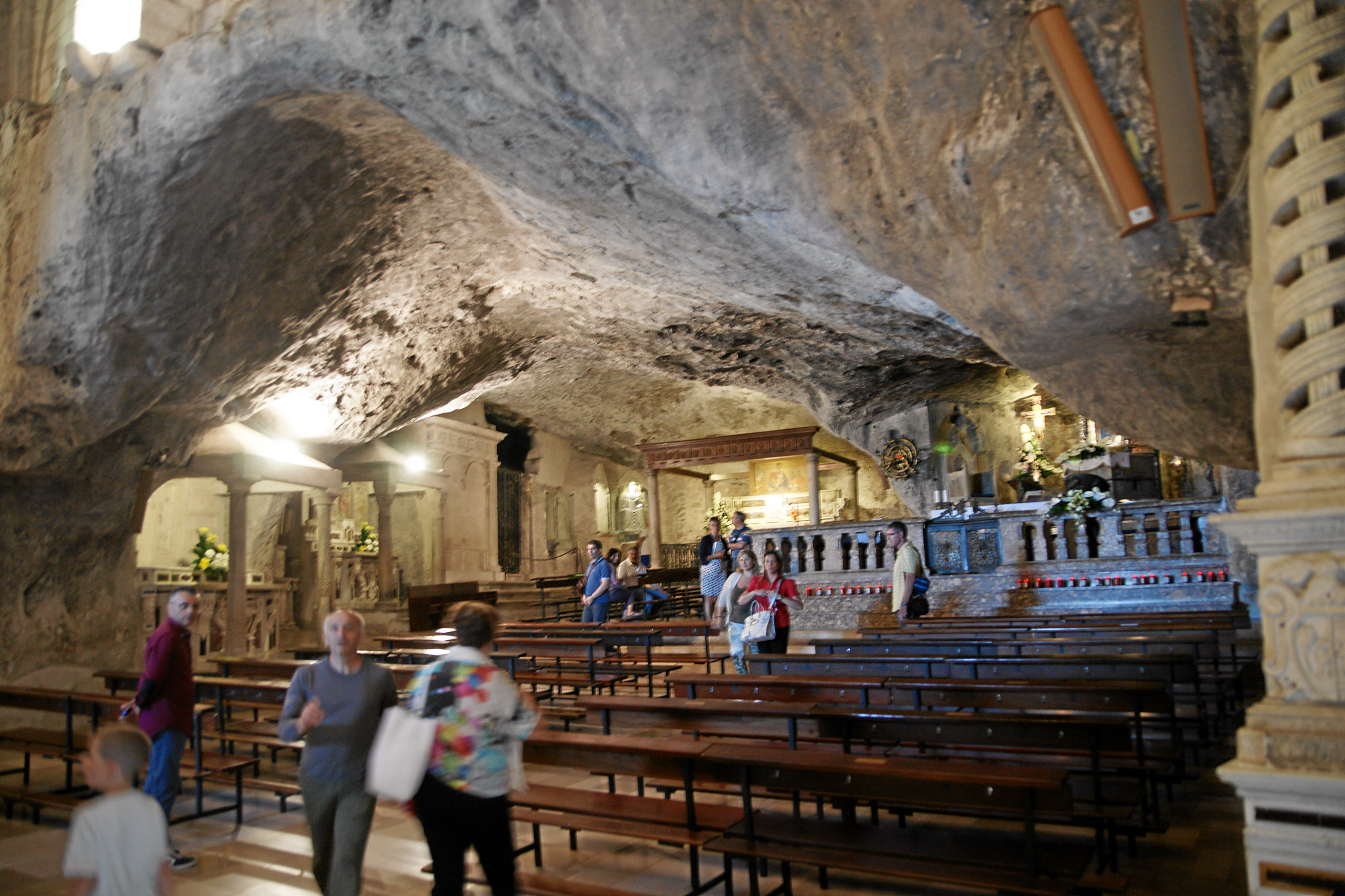 Santuario San Michele Arcangelo